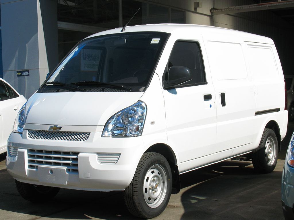 Chevrolet N300 Max 2011